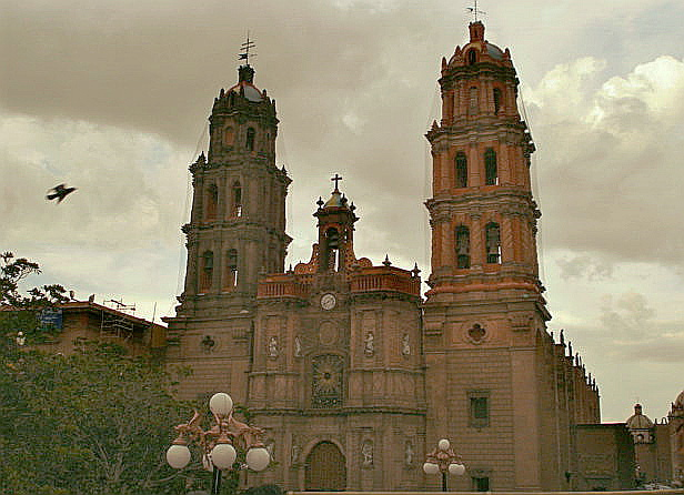 Catedral Metropolitana de la ciudad de San Luis Potosí, México.